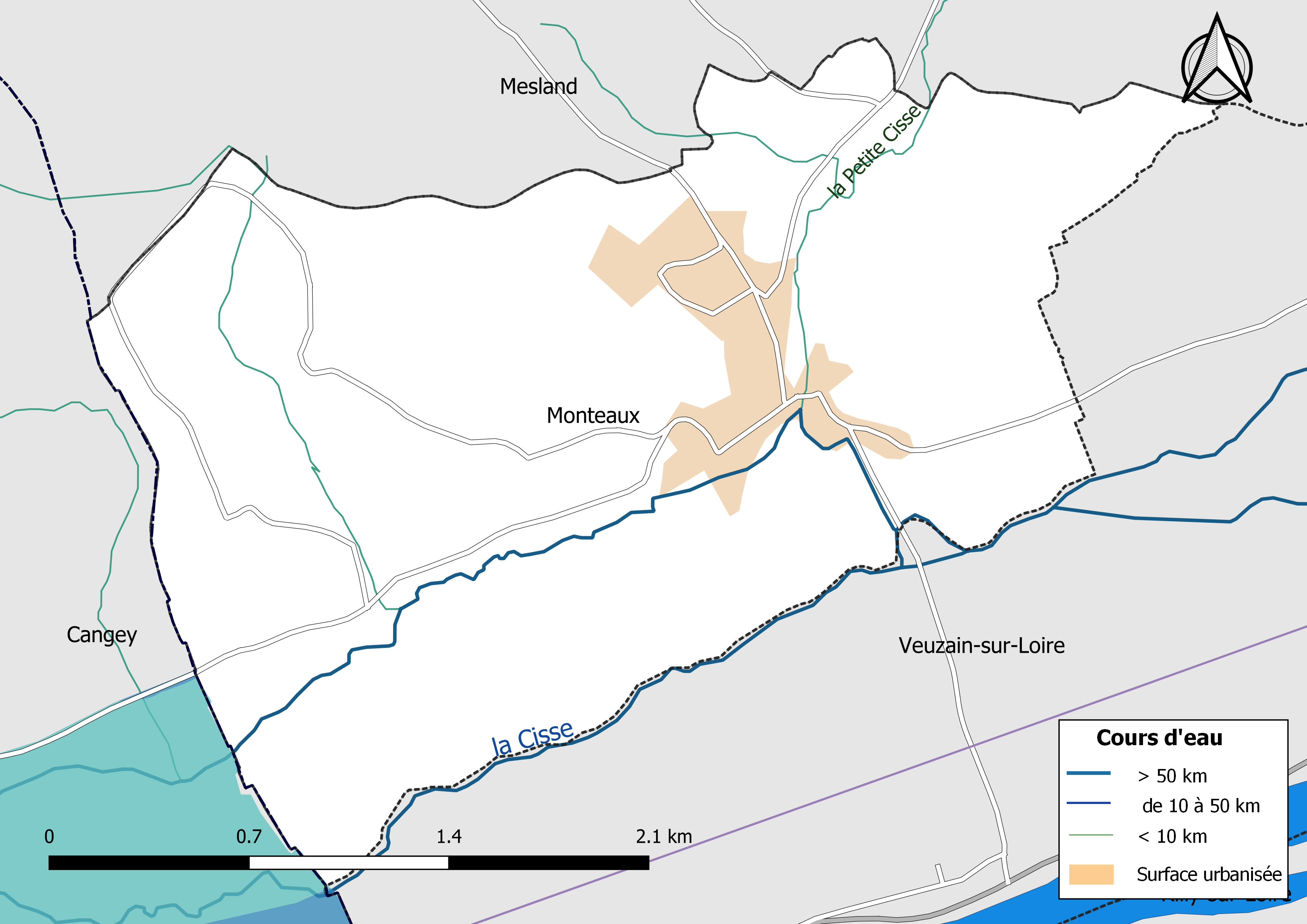 Carte du réseau hydrographique de la commune de Monteaux (Loir-et-Cher, France).